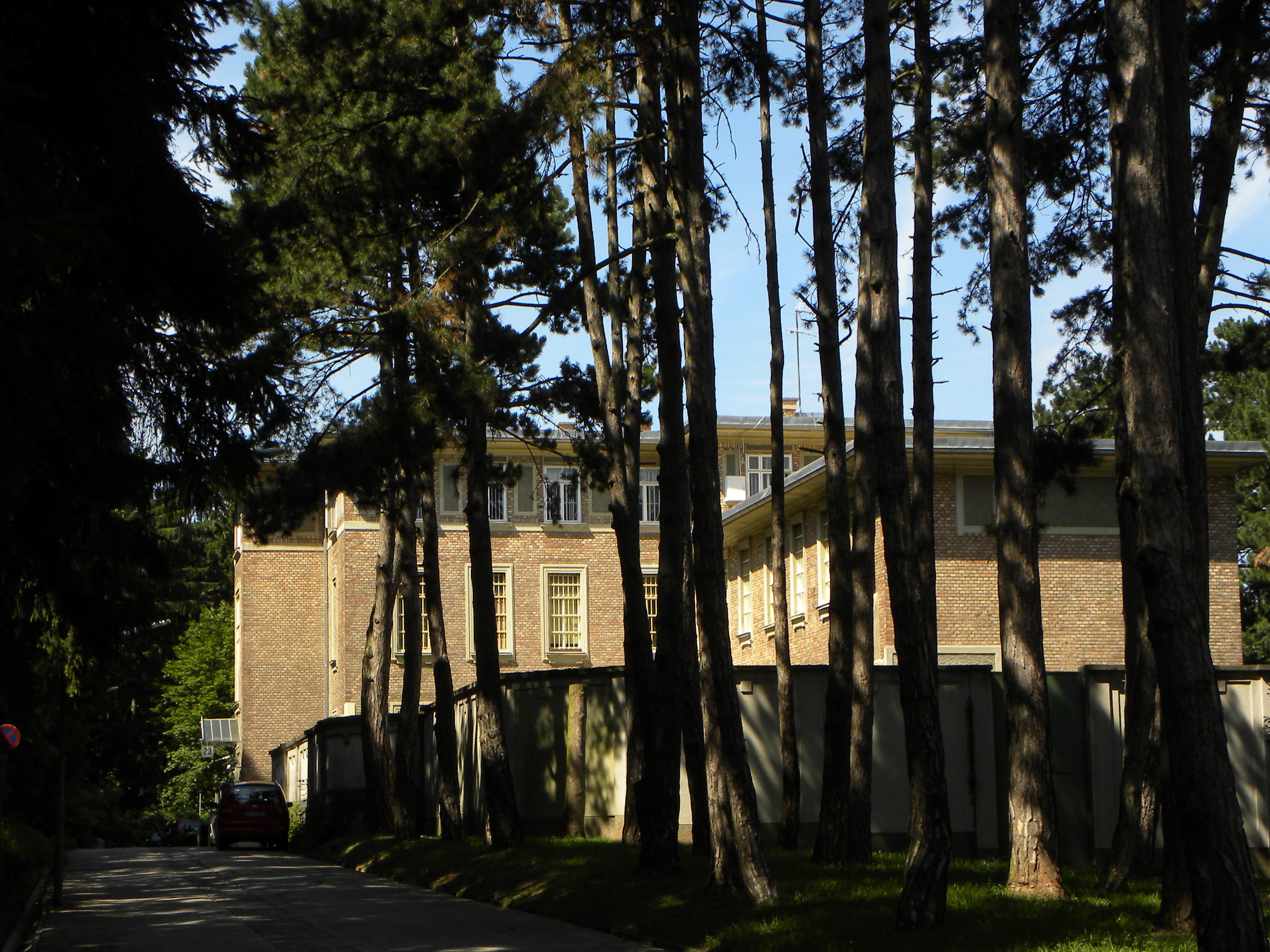 Pavillon 23 wurde für gewalttätige männliche Patienten gebaut und daher mit erhöhten Sicherheitseinrichtungen versehen. Im Rahmen der T4-Aktion wurden die Patienten jedoch in die Tötungsanstalt Hartheim deportiert, das Haus war entleert. Ab Ende 1941 befand sich darin die Städtische Arbeitsanstalt Am Steinhof für asoziale Frauen, die dem Einfluss der zentralen Asozialenkommission unterstand. Nach 1945 wurden mehrere Funktionäre, zwei leitende Ärzte sowie Pflegepersonal der Anstalt vor dem Volksgerichtshof wegen nationalsozialistischer Verbrechen verurteilt. Nach dem Ende des Zweiten Weltkriegs diente der Pavillon einige Monate als Konzentrationslager für Nationalsozialisten, anschließend als Polizeigefängnis. Seit der Strafrechtsreform 1975 befindet sich darin die Abteilung für forensische Psychiatrie.